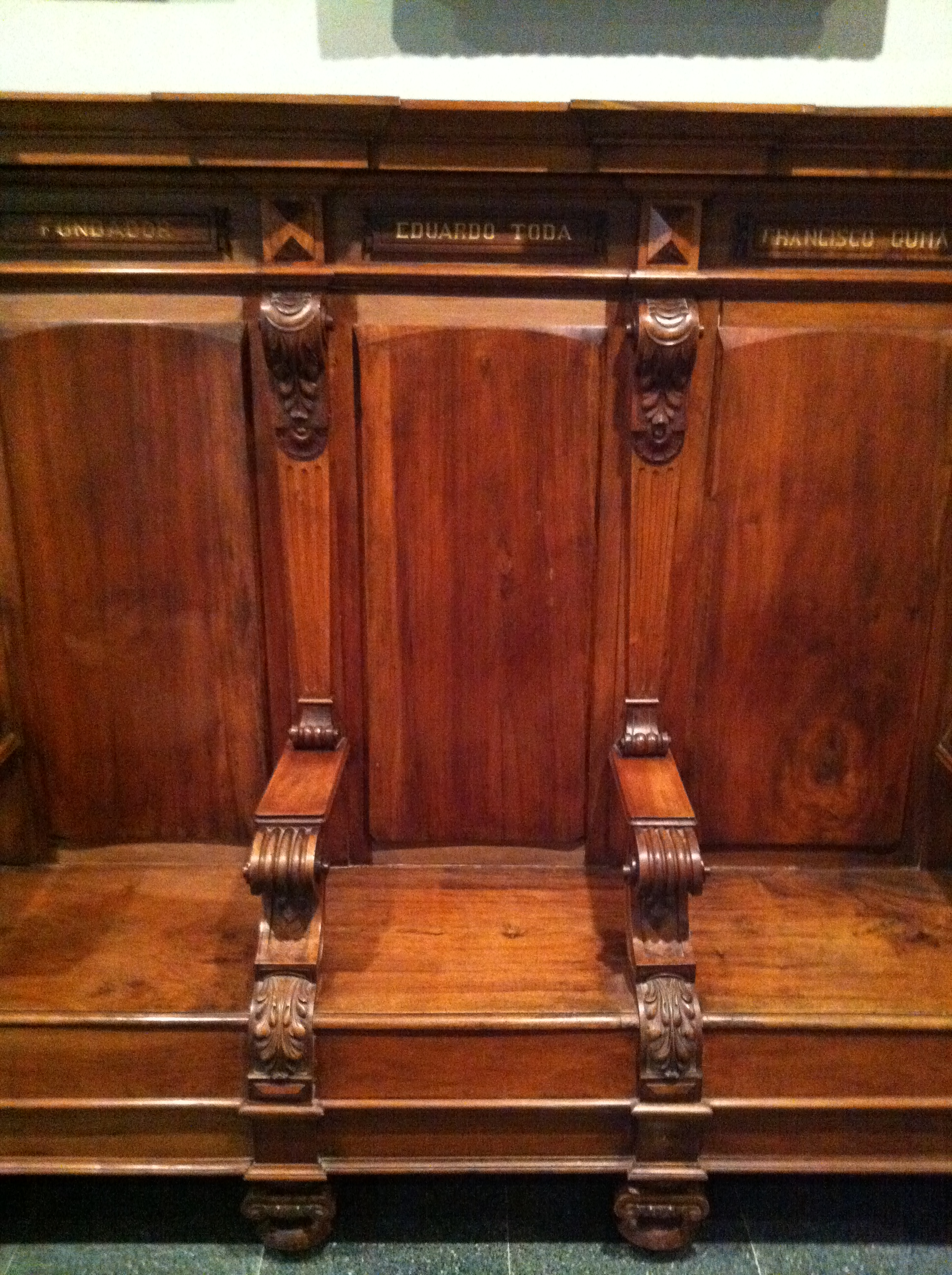 Biblioteca Museu Víctor Balaguer- Sala de juntes- Eduardo Toda